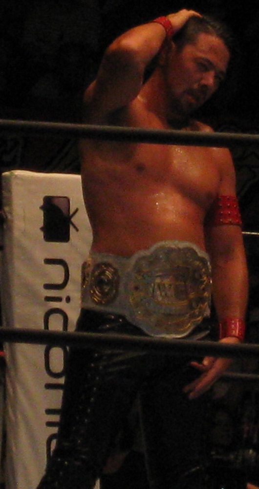 9月29日 神戸大会 「DESTRUCTION」 中邑真輔